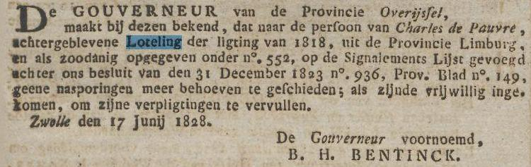 Herontdekte loteling, getekend: B. H. Bentinck